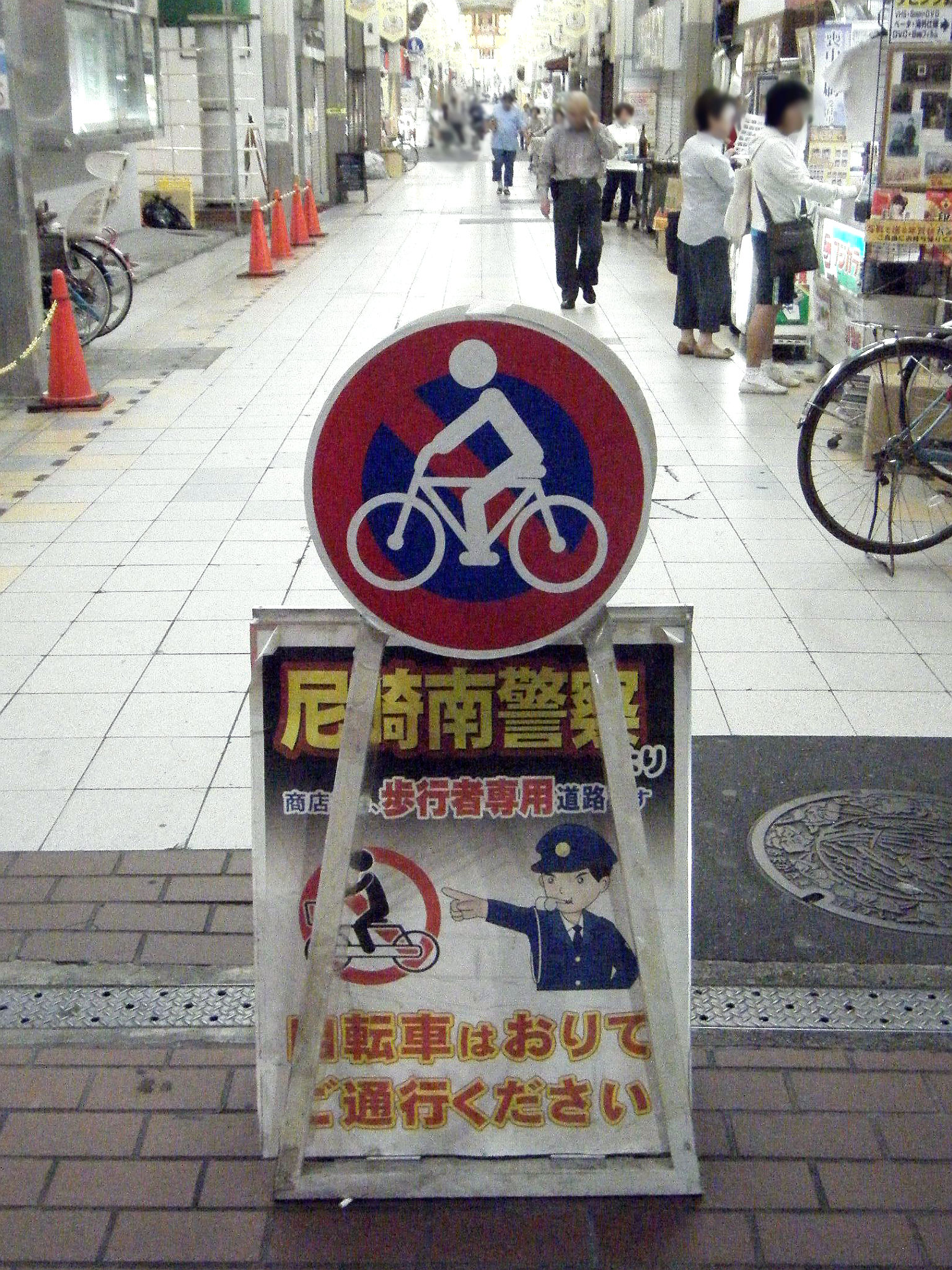 三和本通商店街の自転車通行禁止案内